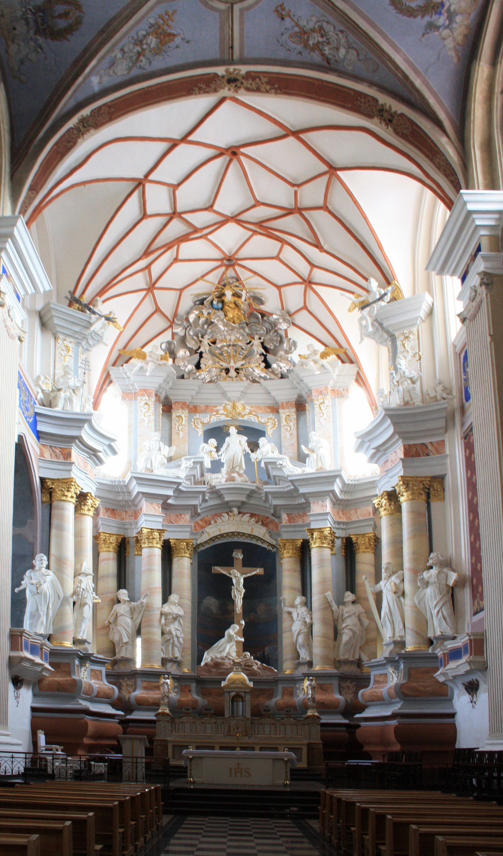 Litauen - Kaunas. Kathedrale-Basilika St. Peter und Paul Innenraum. Gebaut 1408. Größtes gotisches Bauwerk in Kaunas. Adresse: Kaunas, Vilniaus Str. 1.